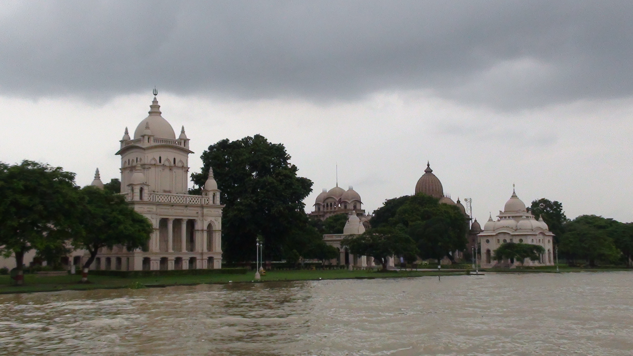 கொல்கத்தாவில் இருந்து அருள்பாலித்த ஸ்ரீஇராமகிருஷ்ணர் வாழ்ந்த, ஸ்ரீவிவேகானந்தர் வளர்ந்த பேளூர் மடம்.